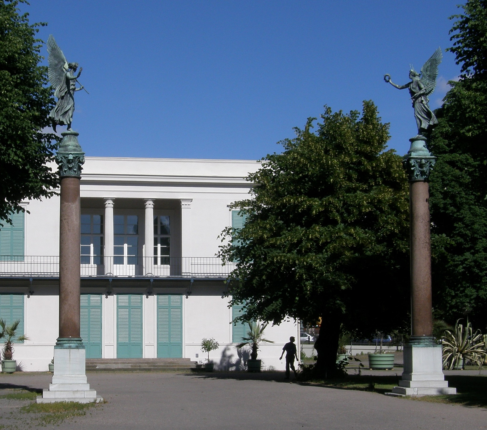 Christian Daniel Rauch - Zwei Friedenssäulen. 1840, Schloßpark Charlottenburg Nähe Schinkel-Pavillon, Engel: Bronze